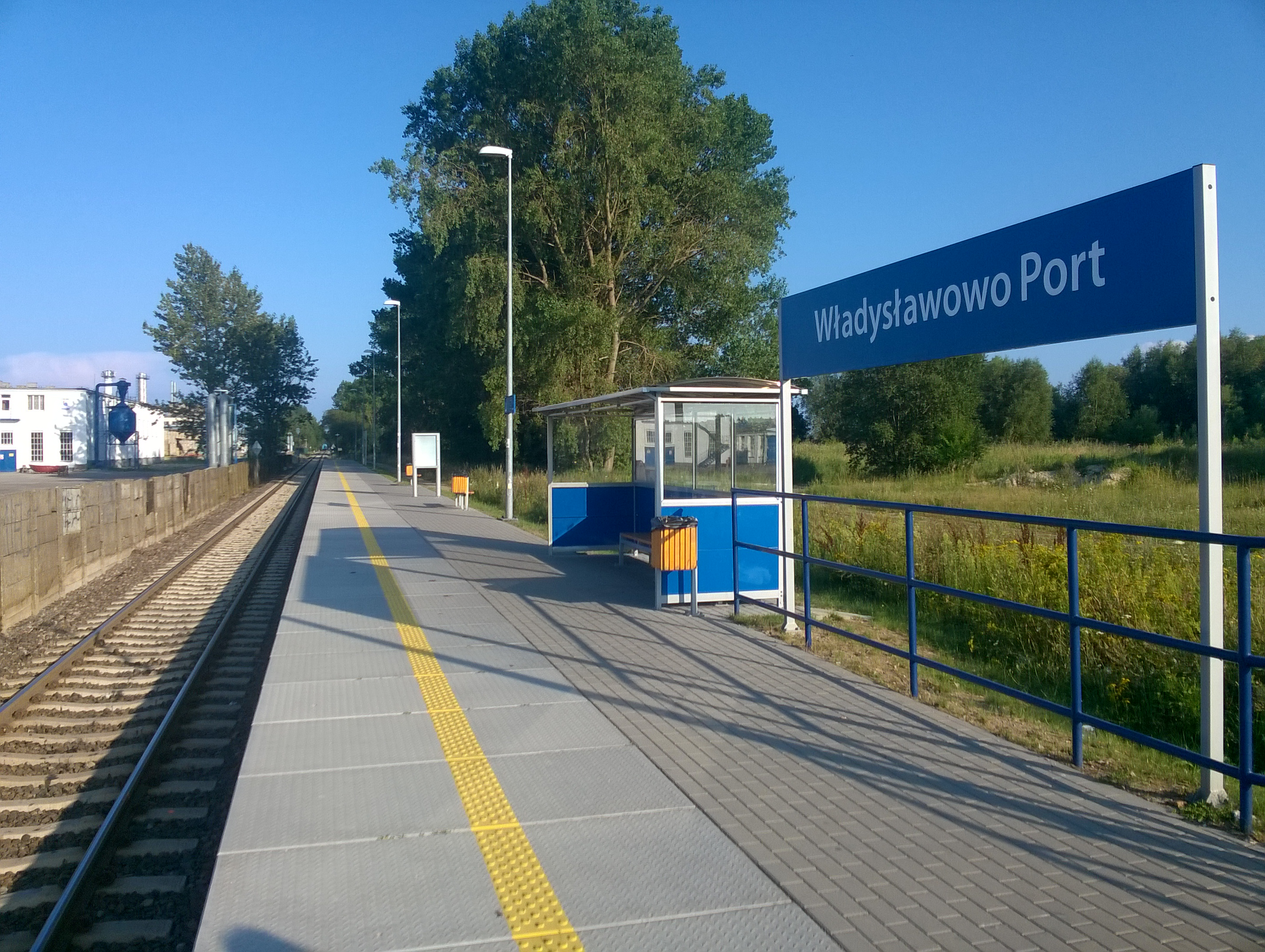 Przystanek osobowy Władysławowo Port